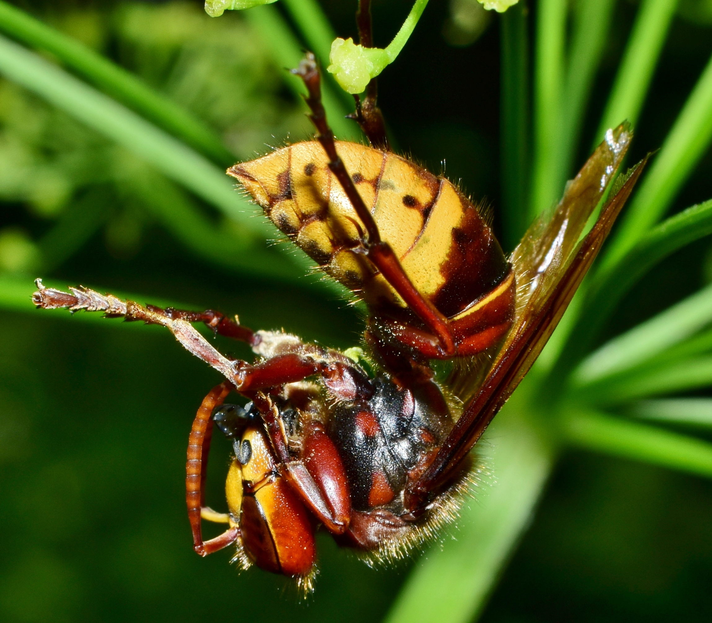 European hornet ( Vespa crabro ) Стършел яде малка оса